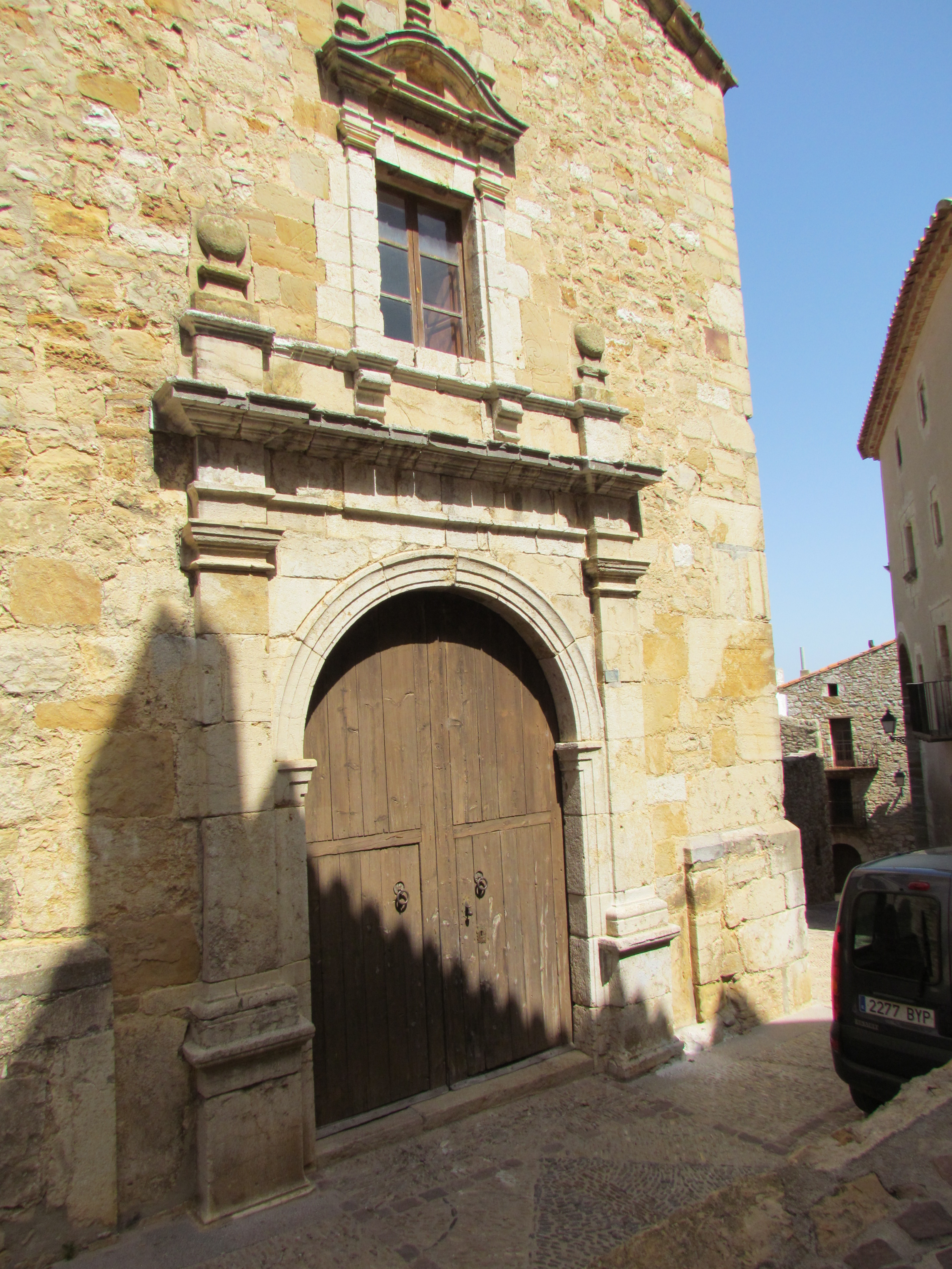 Portada principal de l'església del Salvador de Culla, Alt Maestrat (País Valencià)